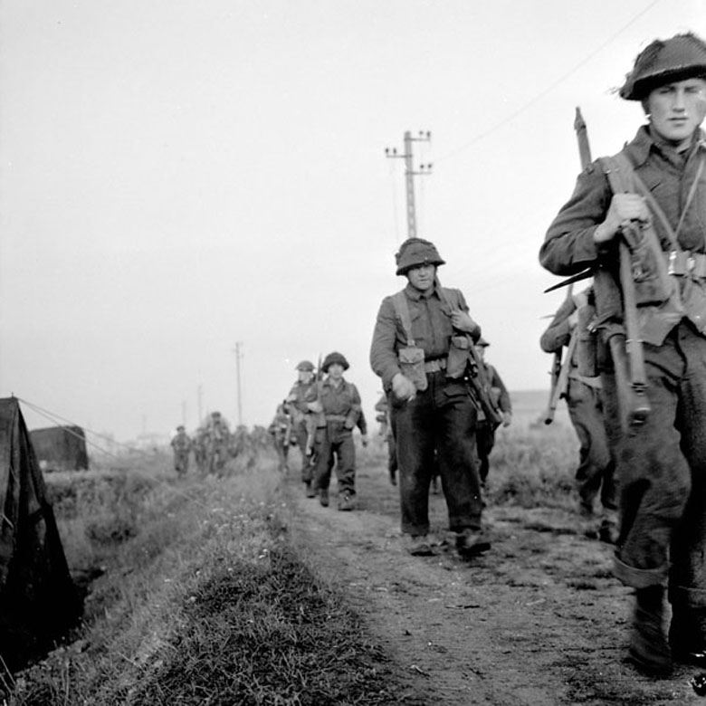 opération Spring